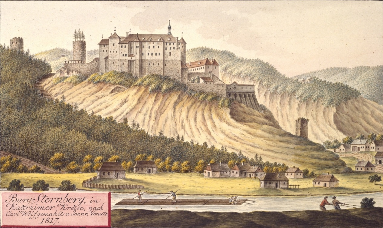 Český Šternberk. Burg Sternberg, in Kauržimer Kreise, nach Carl Wolf gemahlt v. Joann. Venuto 1817